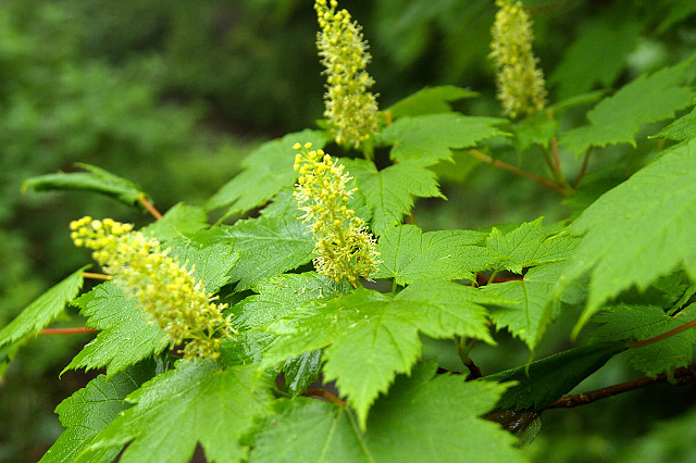 オガラバナ（北海道斜里岳）Acer ukurunduense (Mt. Shari, Hokkaido, JAPAN)